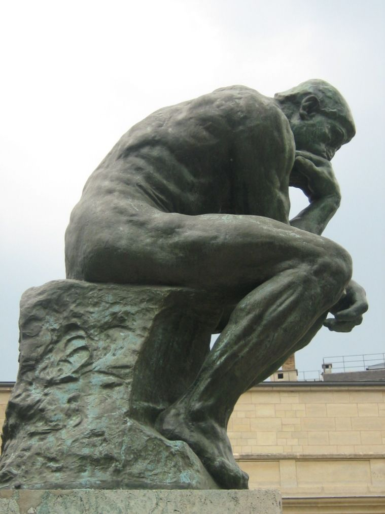 Auguste Rodin: Le Penseur, Hôtel Biron, Jardin du Musée Rodin, Paris VIIe, France.